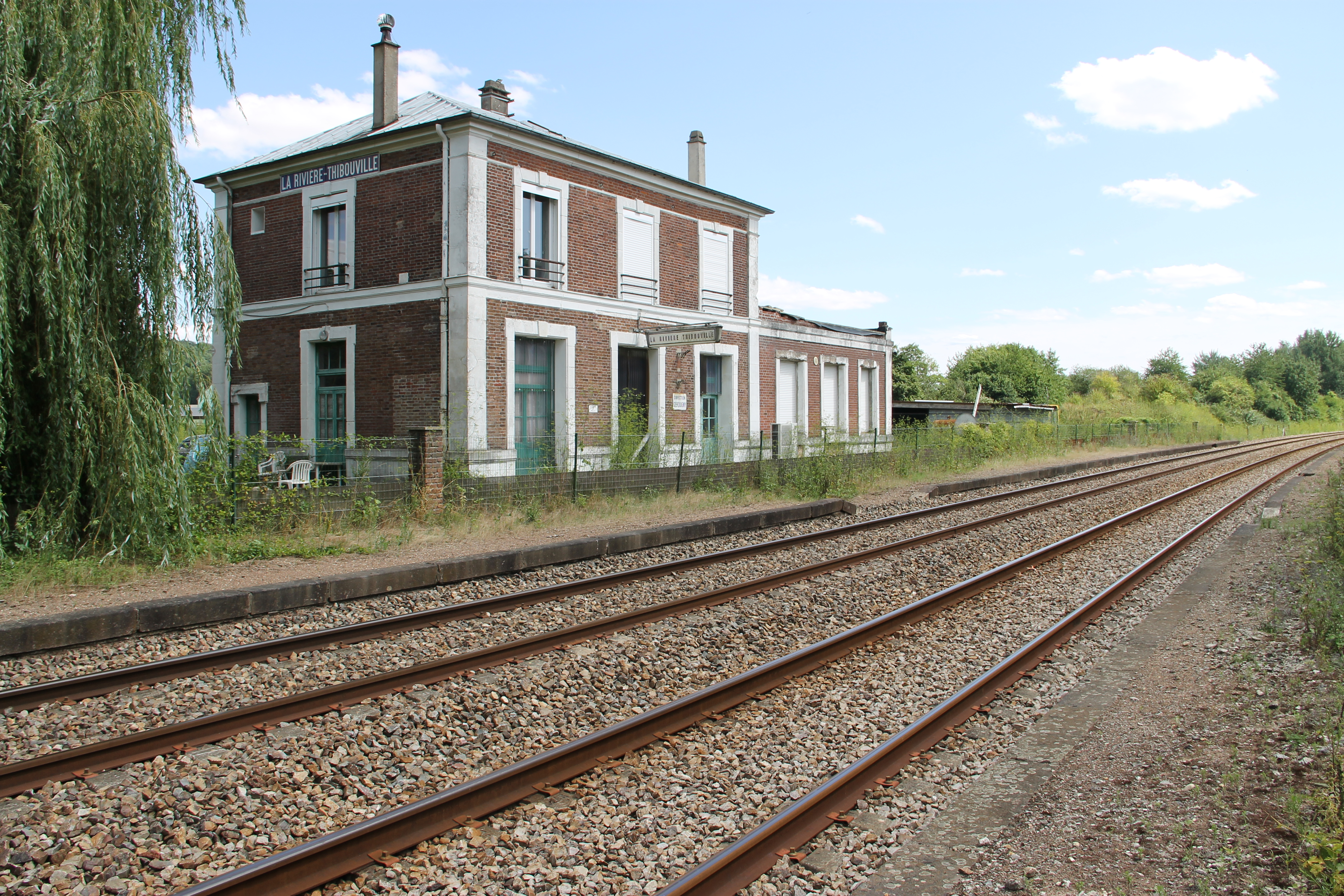 Ancienne gare de La Rivière-Thibouville, département de l'Eure, France.